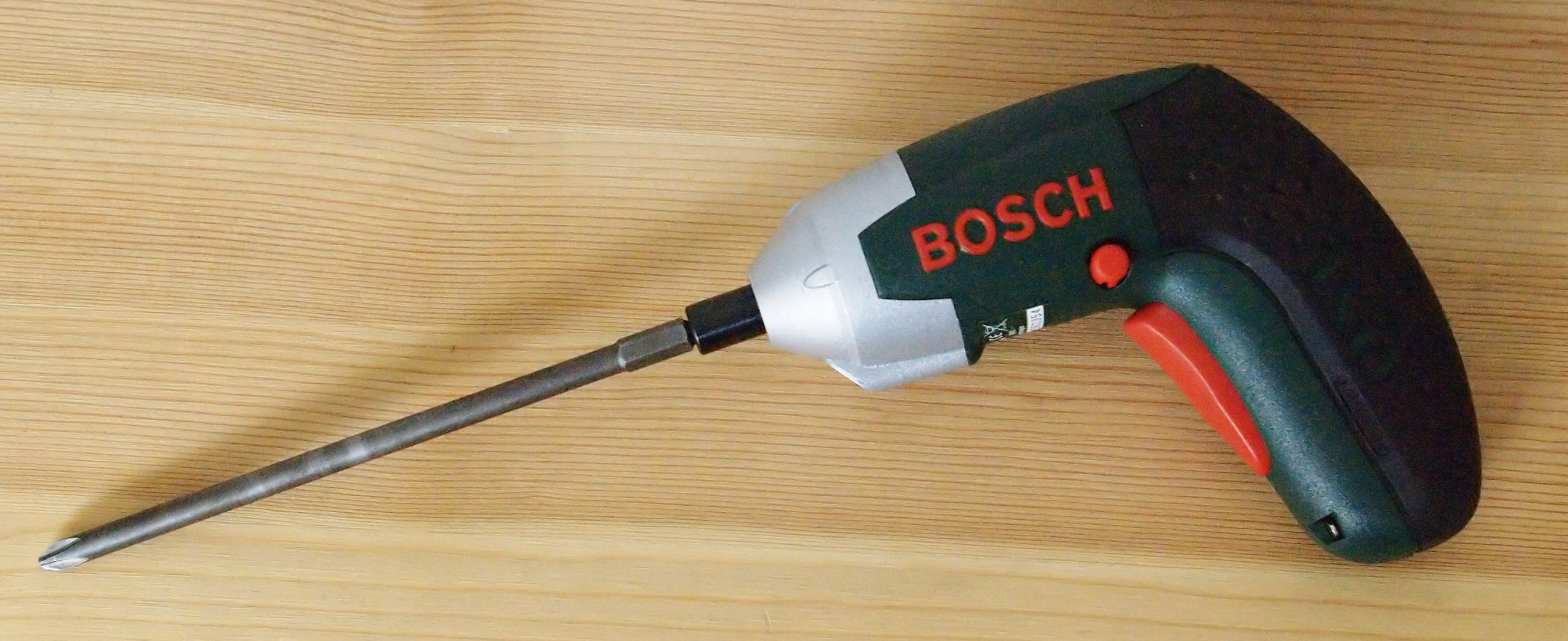 Schrauberbit, extra lang (PH2, 150mm), an einem kleinen Elektroschrauber für leichte Montagearbeiten an schlecht zugänglichen Stellen